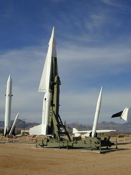 MIM-14 Nike-Hercules